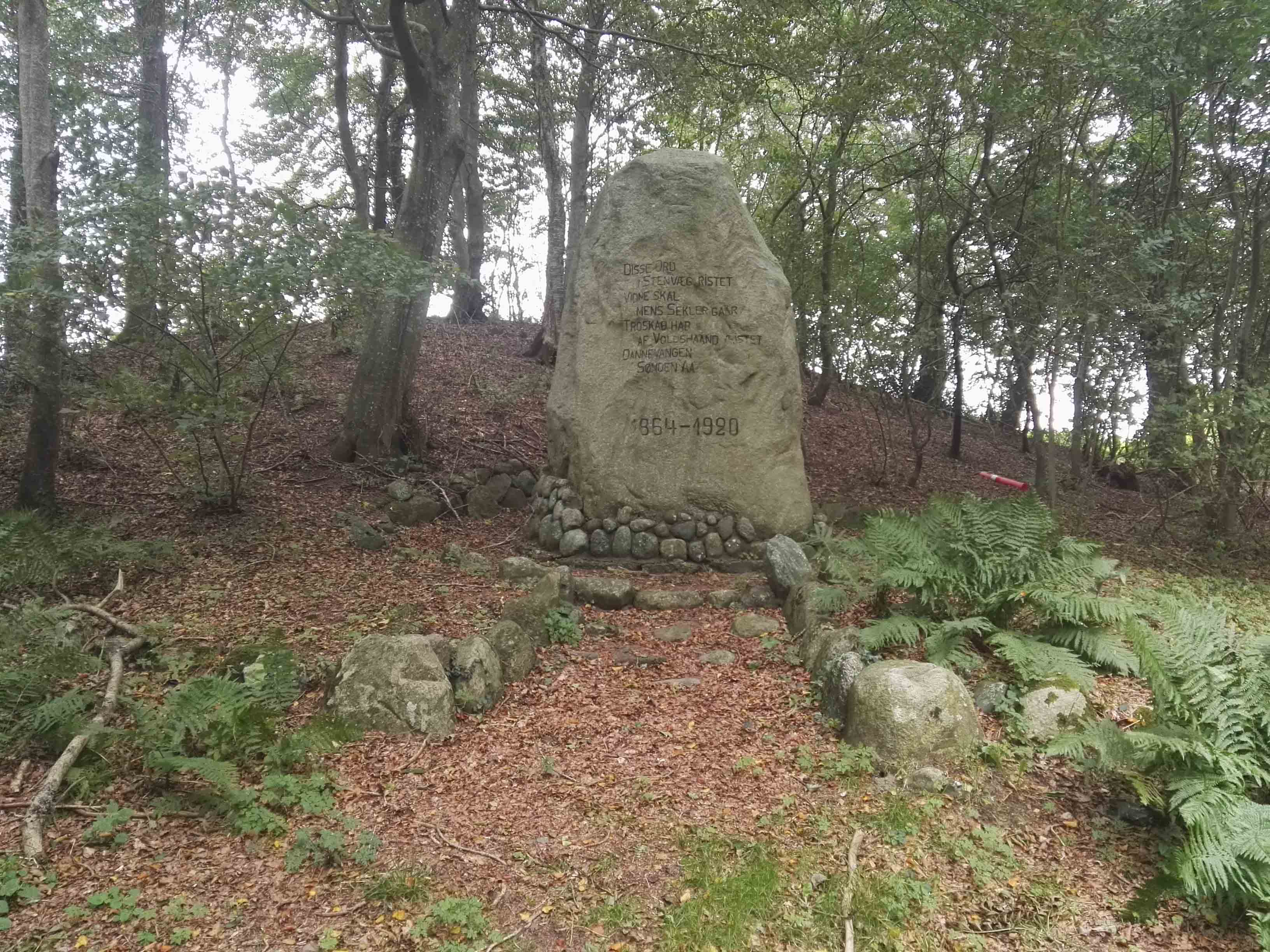 Genforeningsstenen i Bøge Bakker ved Brovst med inskriptionen:Disse ordi stenvæg ristetvidne skalmens sekler gaartroskab haraf voldshaand mistetDannevangensønden aa